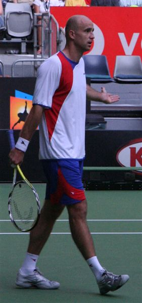 Ivan Ljubičić questioning the umpire